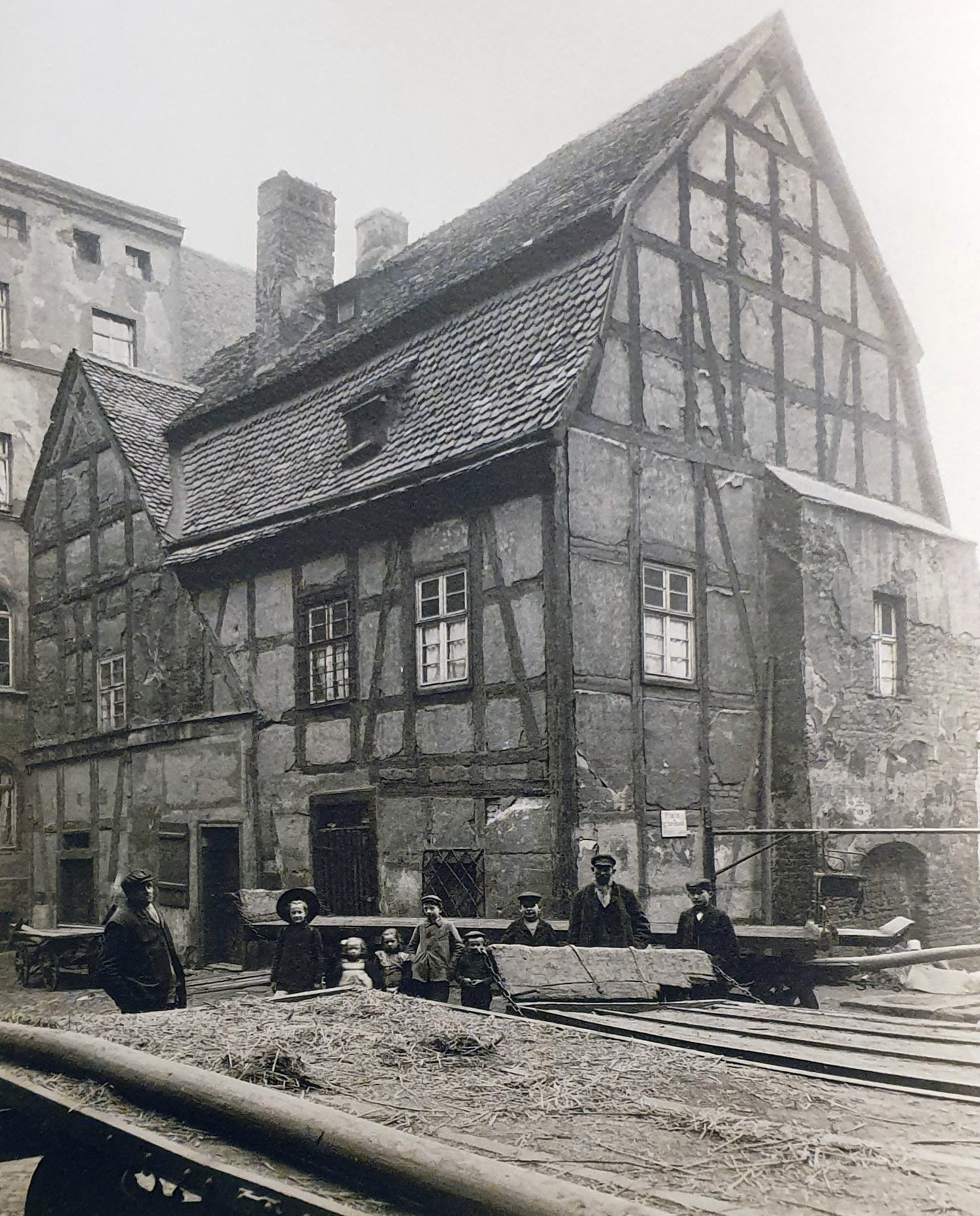 Synagoga Krajowa we Wrocławiu w pasażu Pokoyhofa, koniec XIX wieku, widok tyłu budynku